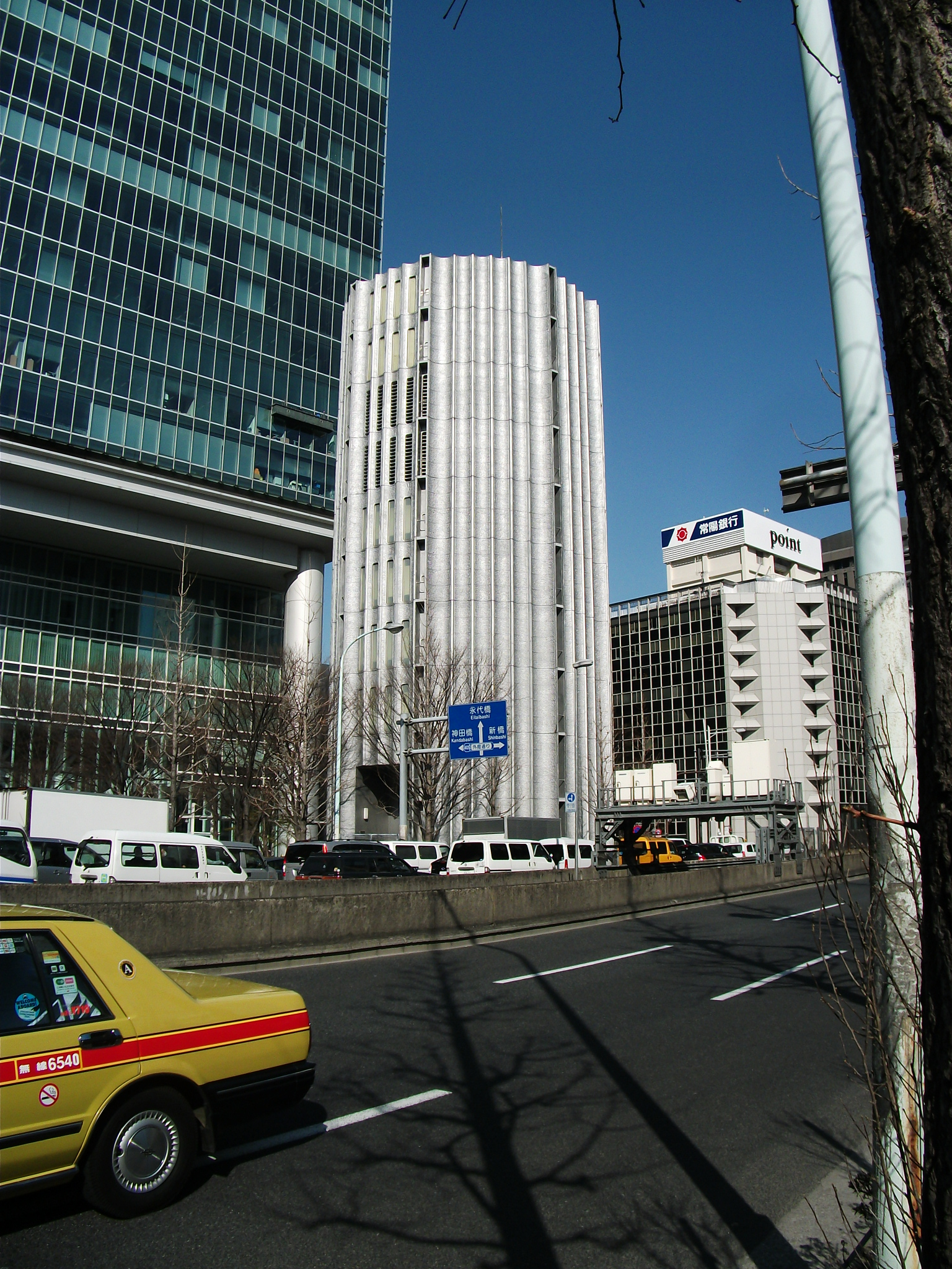 東京都中央区八重洲、首都高速八重洲線八重洲トンネルの鍛冶橋換気所